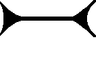 Cuneiform sign